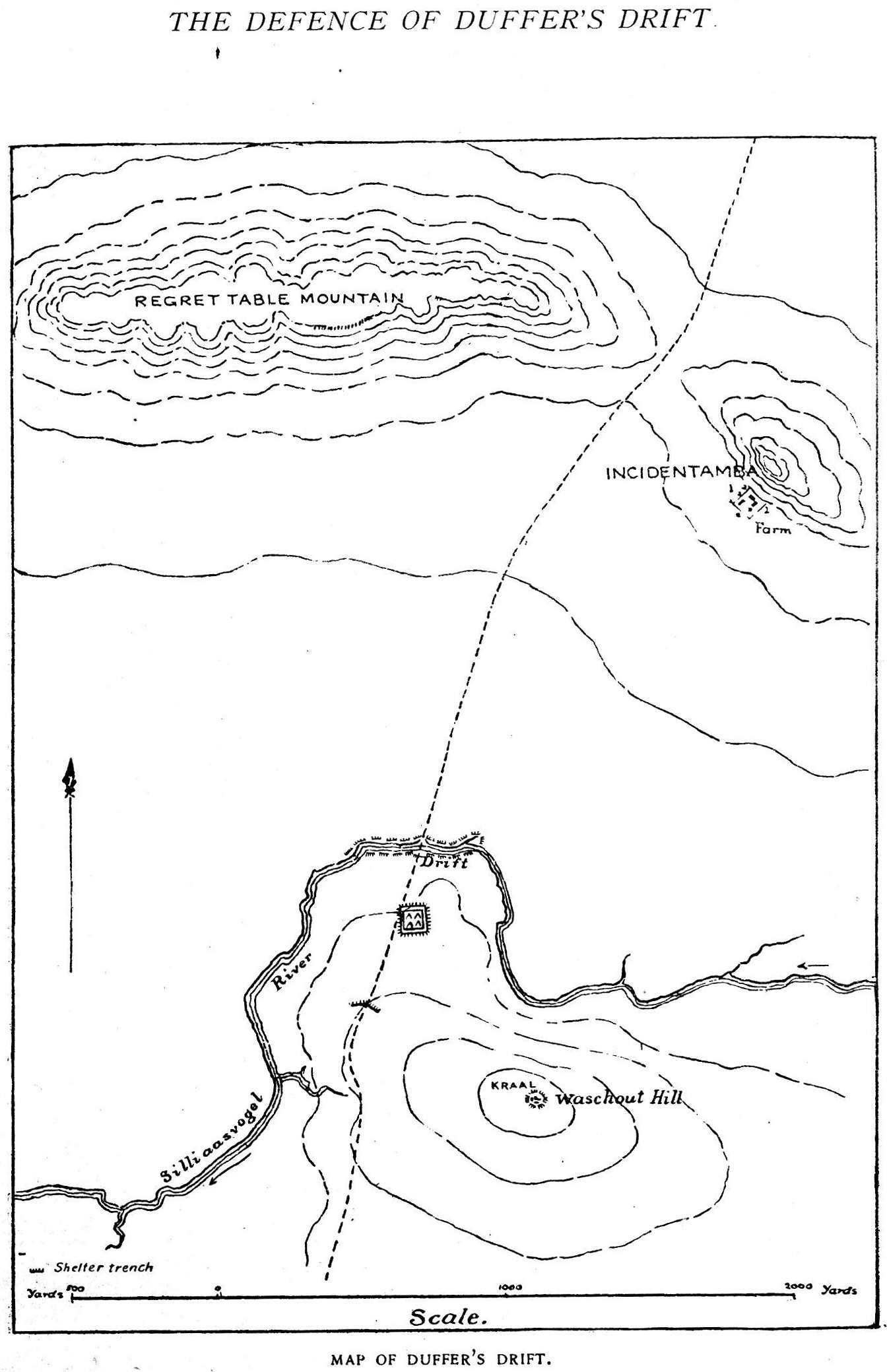 「愚者の渡しの防御」の舞台となる「愚者の渡し」の地図。